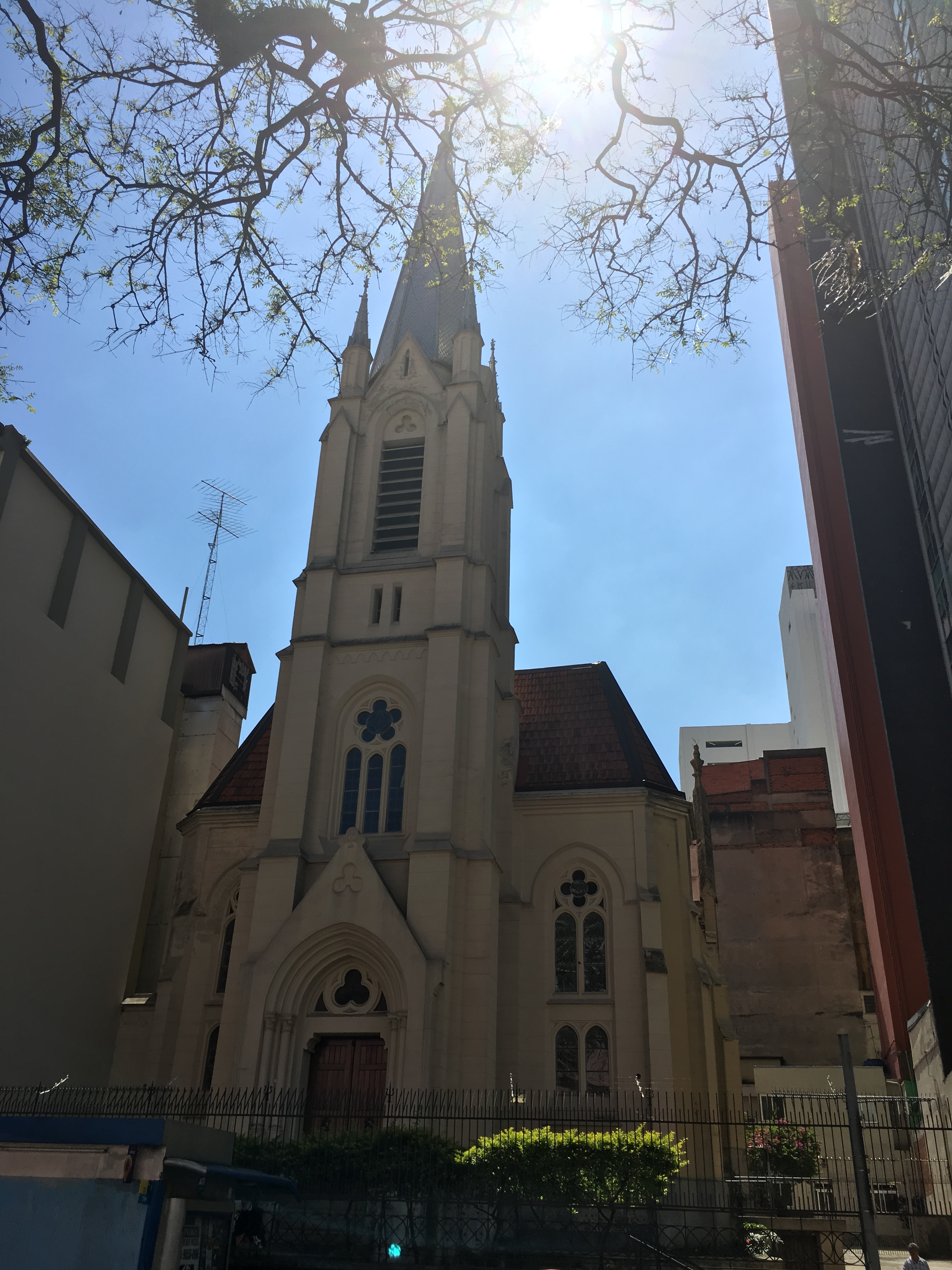 Imagem externa da Igreja Luterana Martin Luther, no Largo do Paissandu (São Paulo-SP, Brasil), feita da avenida Rio Branco.